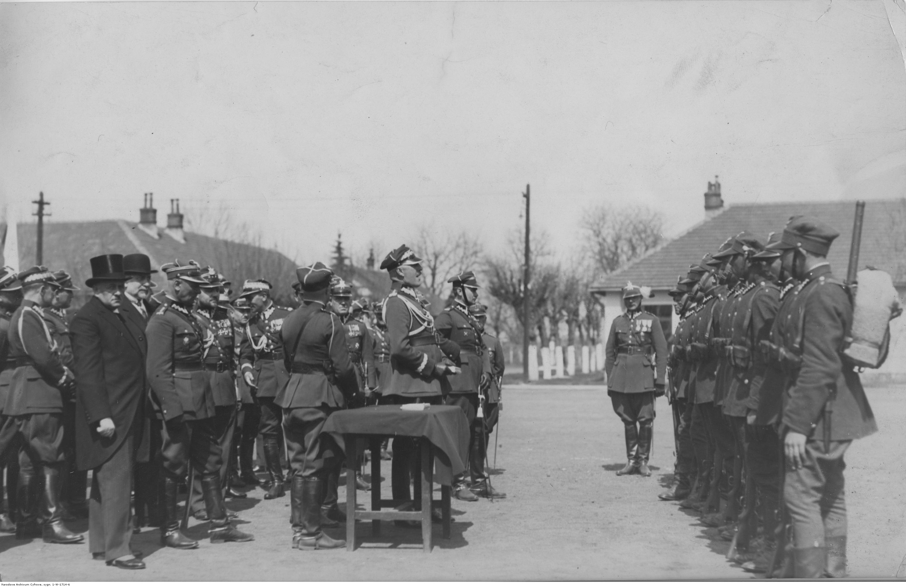 Święto 5 Batalionu Saperów w Krakowie; maj 1929. Gen. Stanisław Wróblewski przemawia do odznaczonych. Widoczni także m.in.: minister Ignacy Boerner (na pierwszym planie 1. z lewej), prezydent Karol Rolle (na prawo od ministra Boernera), płk Marian Bolesławicz. gen. Mieczysław Smorawiński. Koncern Ilustrowany Kurier Codzienny - Archiwum Ilustracji. Sygnatura: 1-W-1714